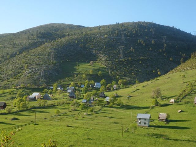 Засеок Јовићи и Божовићи - Бобово - Пљевља